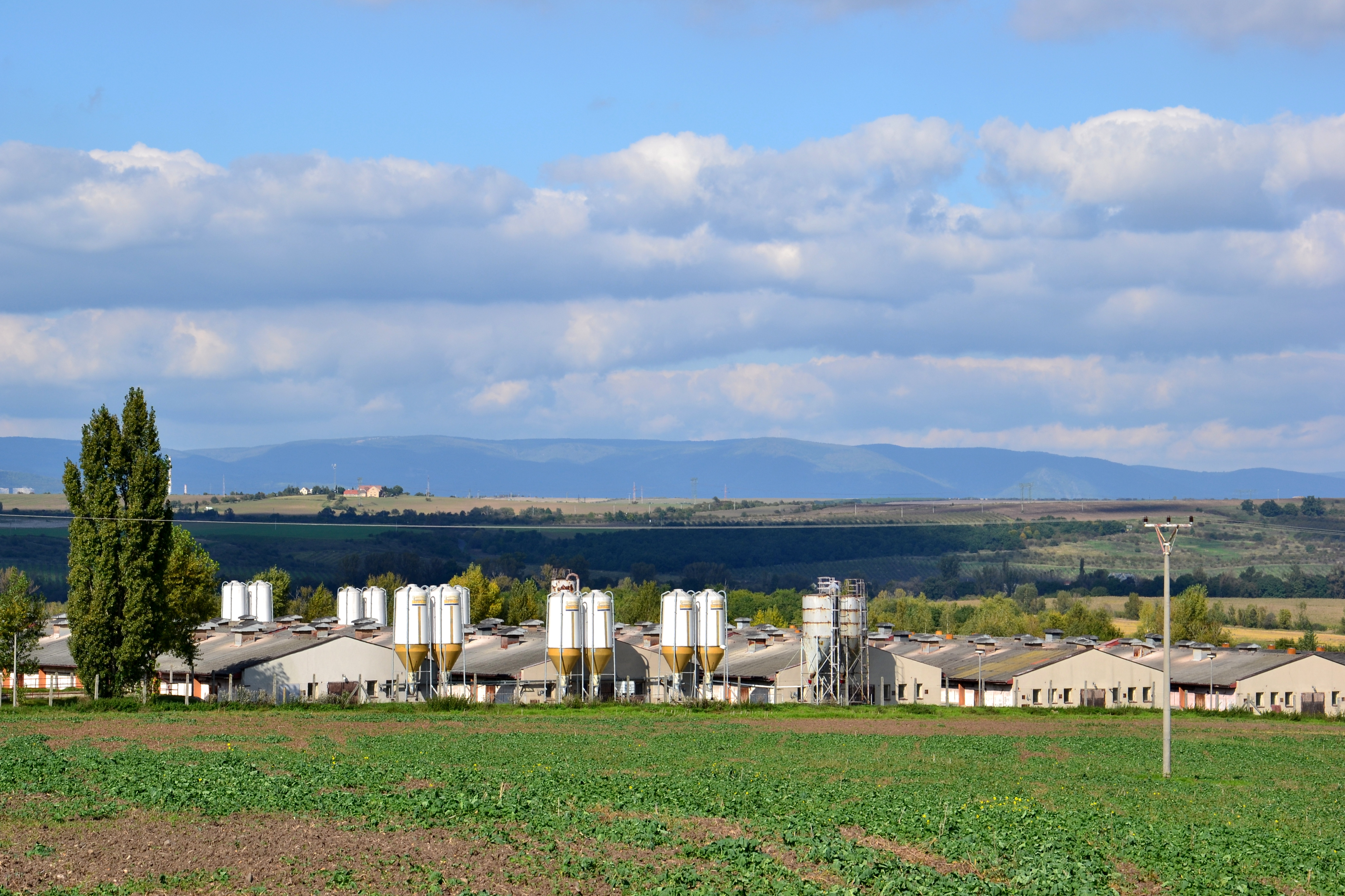 Soběsuky - vepřín